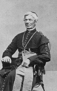 František Petr Krejčí (1796 - 1870), Český katolický kněz a politik.